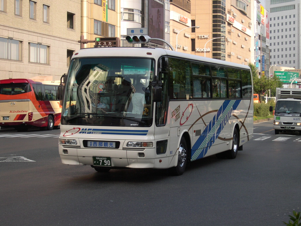 名古屋市内にて 2006-9-3撮影